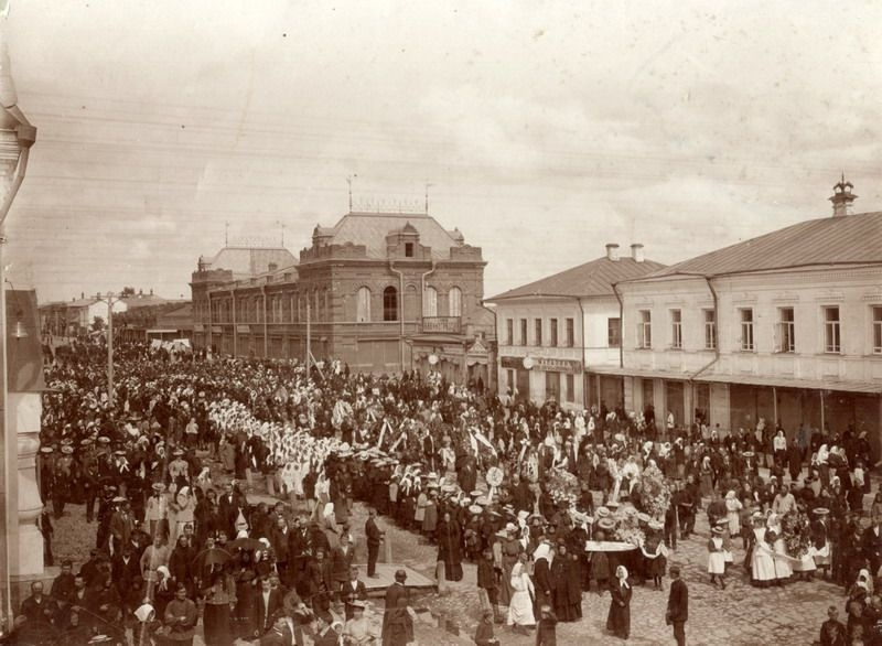 Череповец. Похороны Милютина Ивана Андреевича (гор.голова, купец 1й гильдии). июнь 1907г. Изображенные в центре-слева (нынешний Советский проспект 30) и справа (улица Ленина 30, 28 и 26) дома сохранились и даже не надстроены. Дома поменьше "облагорожены" утепленной отделкой, но вполне узнаваемы, большой дом 30 - нынешний череповецкий художественный музей - так и стоит в красном кирпиче. А вот на месте домиков, что дальше музея по улице - дома надстроены и объединены в нечто трехэтажное, но также "исторически" выглядящее.